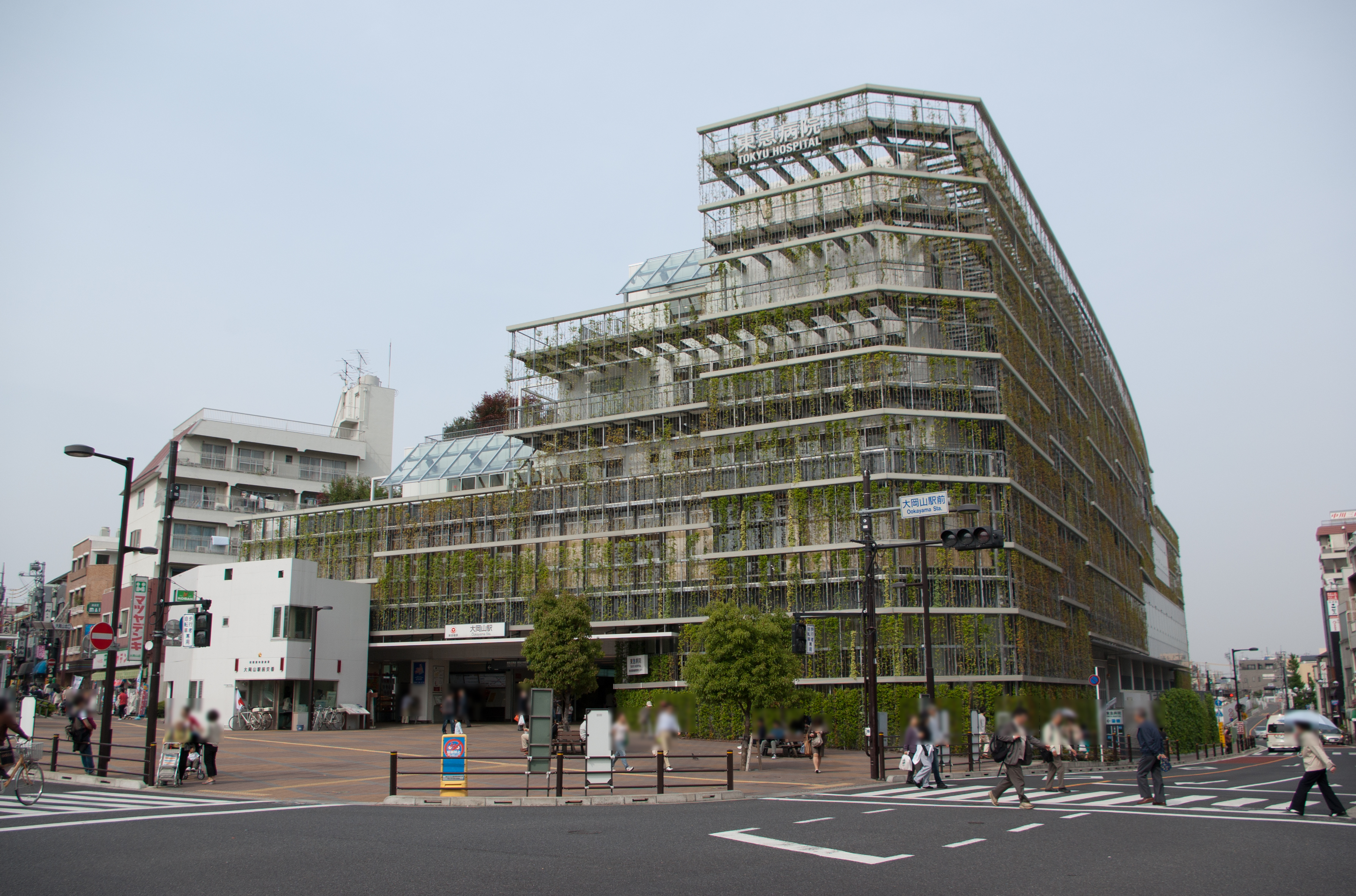 東京急行電鉄株式会社目黒線、大井町線大岡山駅